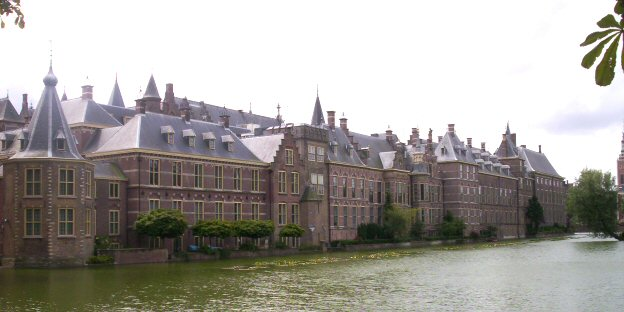 Binnenhof gezien van de Korte Vijverberg (eigen foto Gebruiker:Känsterle 13 juli 2004 - public domain)